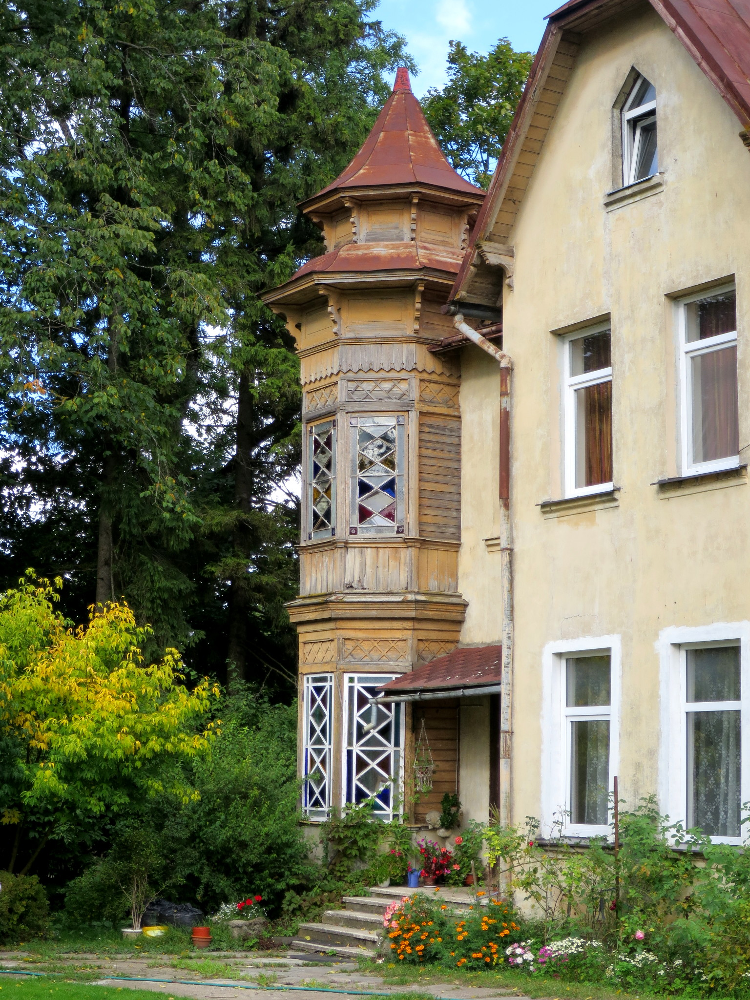 Dzīvojamā ēka, Sigulda, Šveices iela 27a